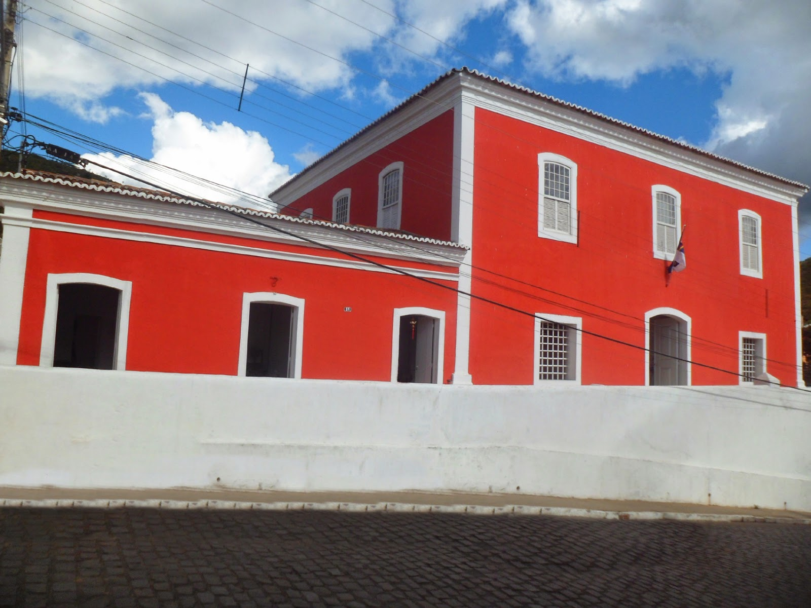 Casa da Câmara e Cadeia do Brejo da Madre de Deus Pernambuco, projetada por Louis Léger Vauthier entre 1837 e 1847 sendo sua unica obra no interior do estado.